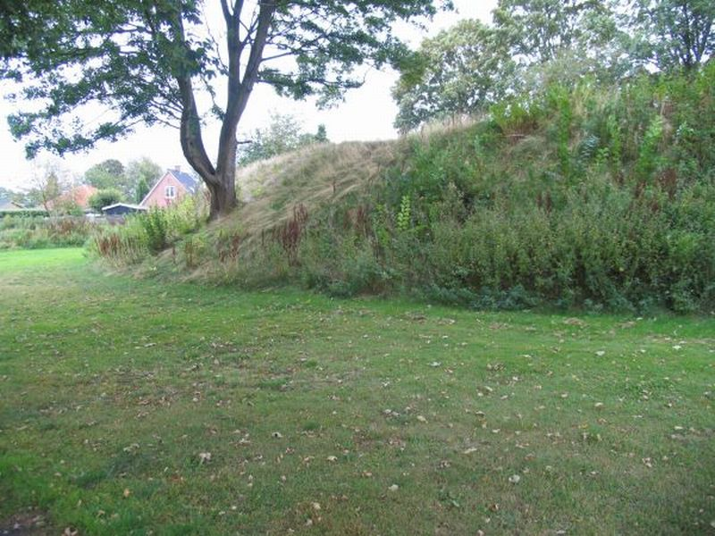 Vangede batteri, batteriets nordlige del